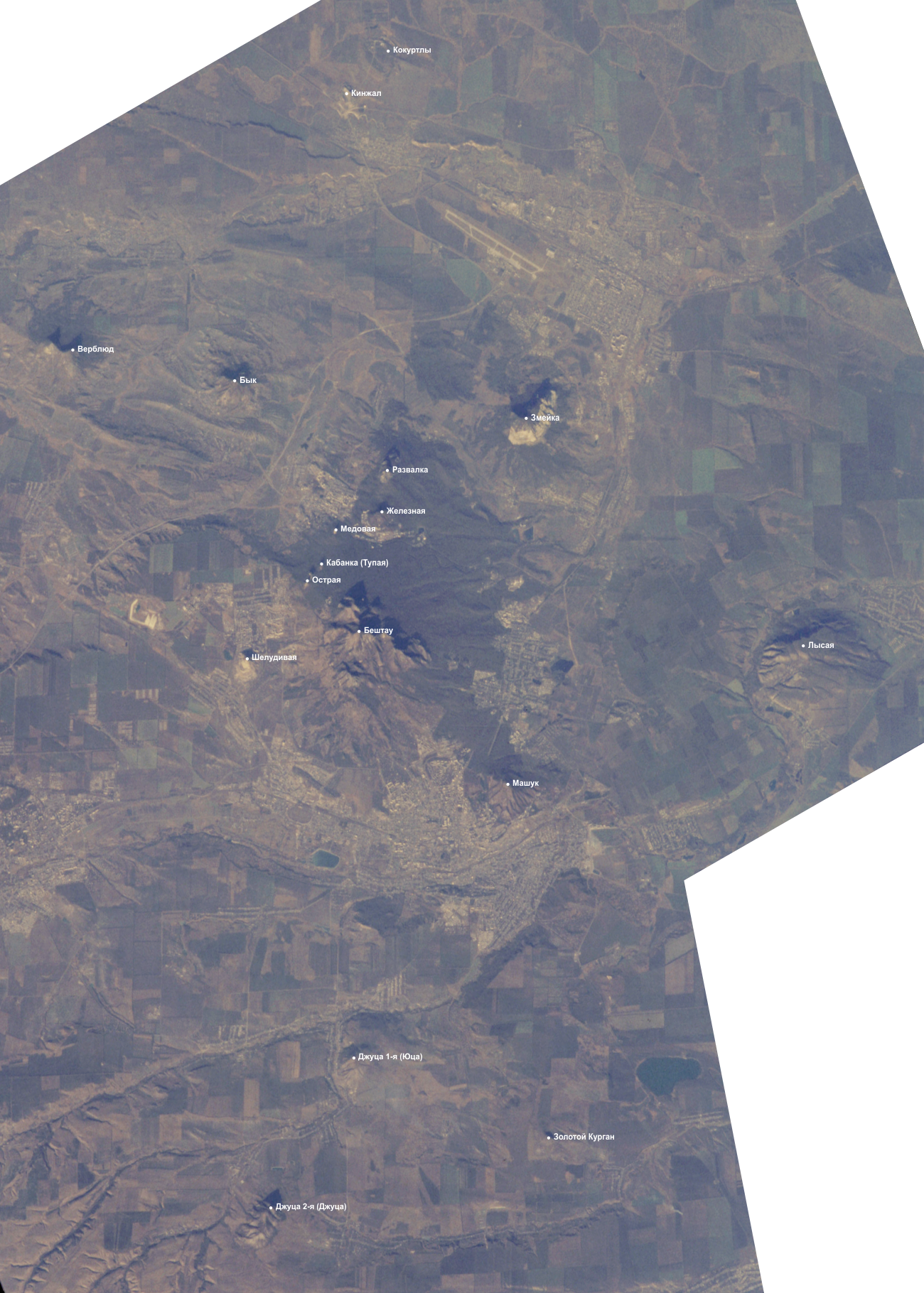 Горы Пятигорья. Снимок с МКС. Фрагмент